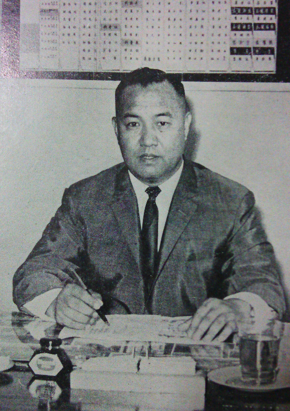 中文（台灣）: 臺中市立第一中學校長汪廣平先生